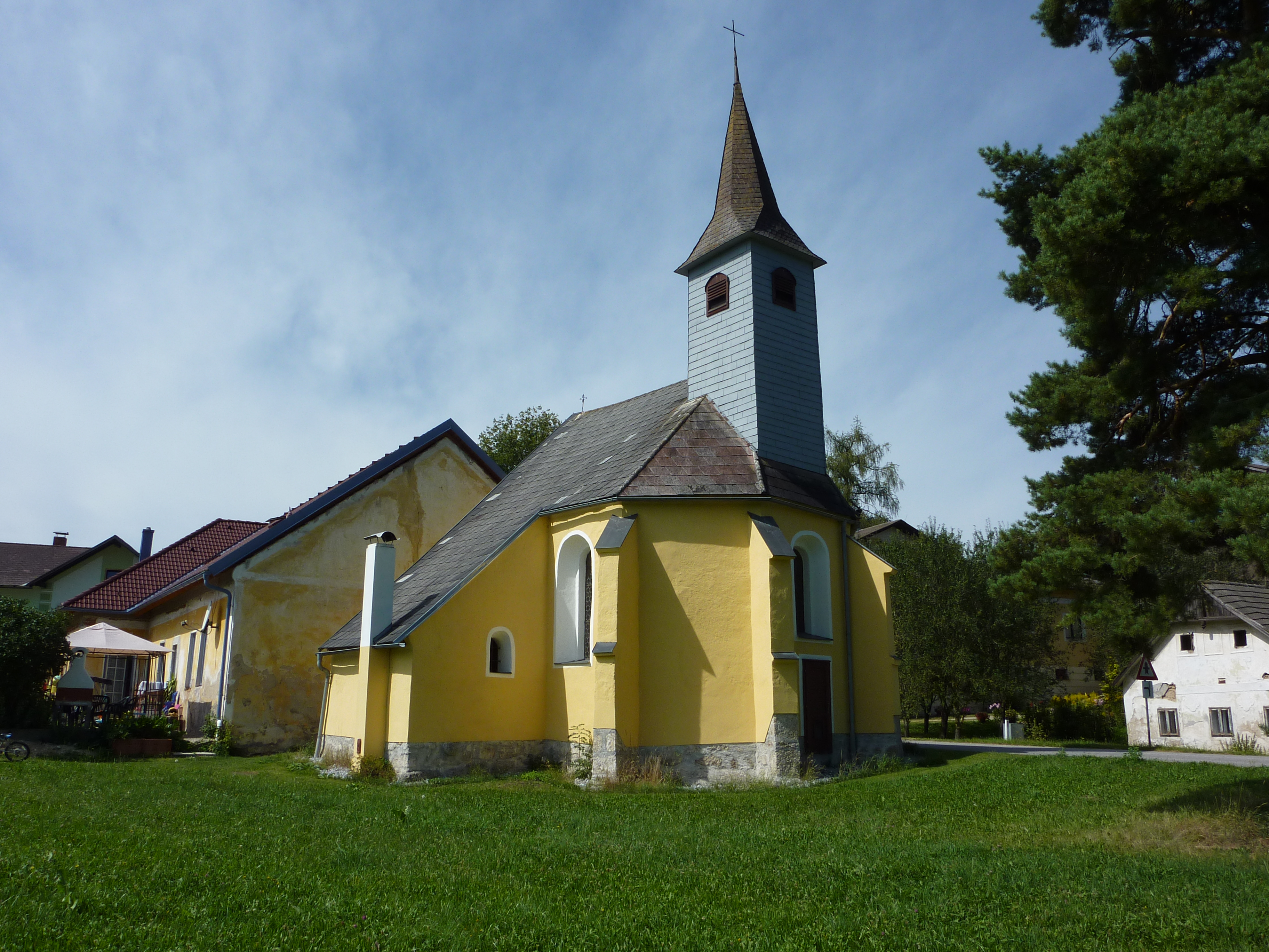 Filialkirche, Pehendorf, Rappottenstein, Niederösterreich